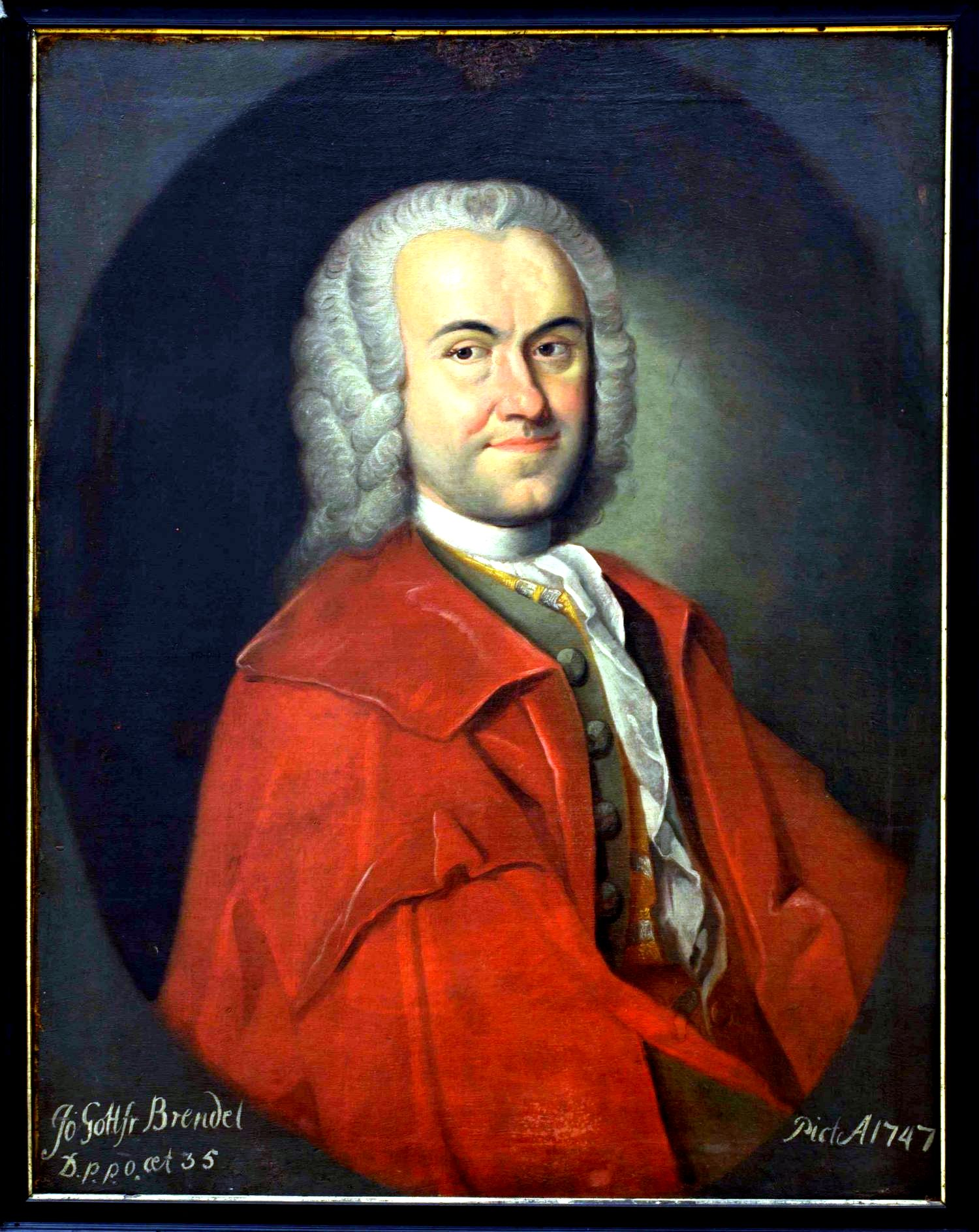 Porträt des Artzes Johann Gottfried Brendel, Gemälde von F. Reibenstein, Öl auf Leinwand, 1747